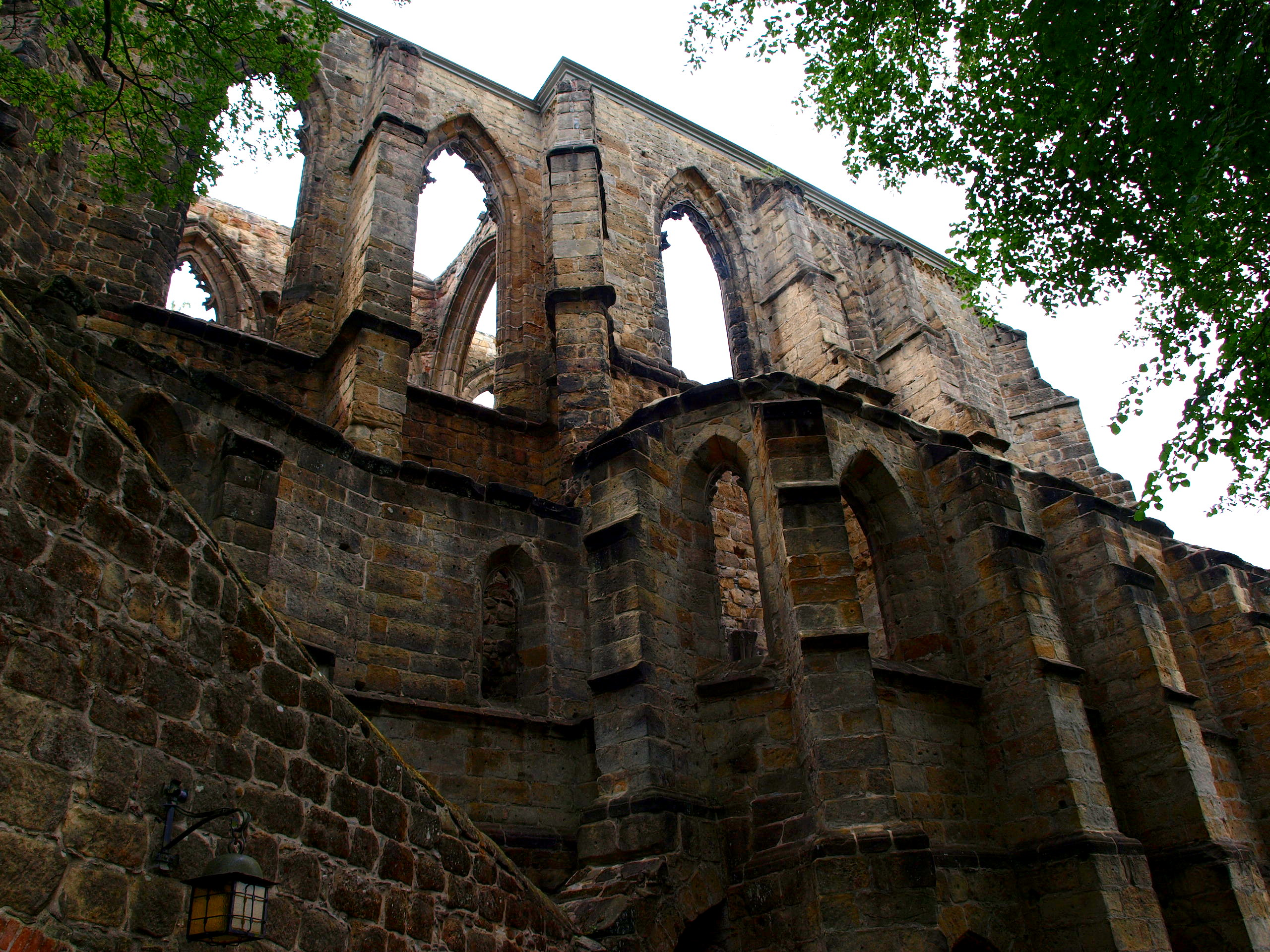 Česky: Hrad Ojvín (kostel)